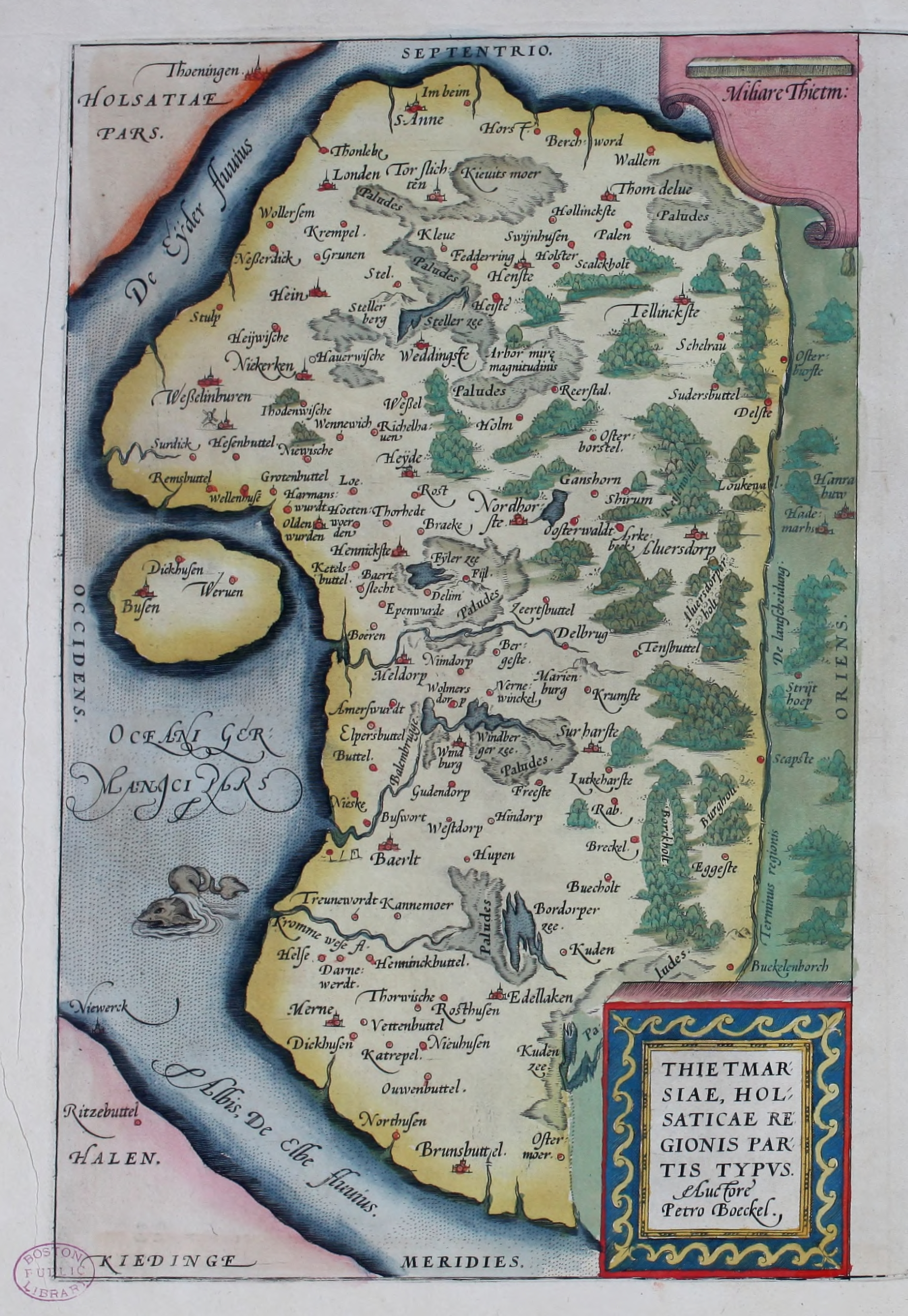 Dithmarschen in der Theatrum Orbis Terrarum (Internet Archiv)/ 1570